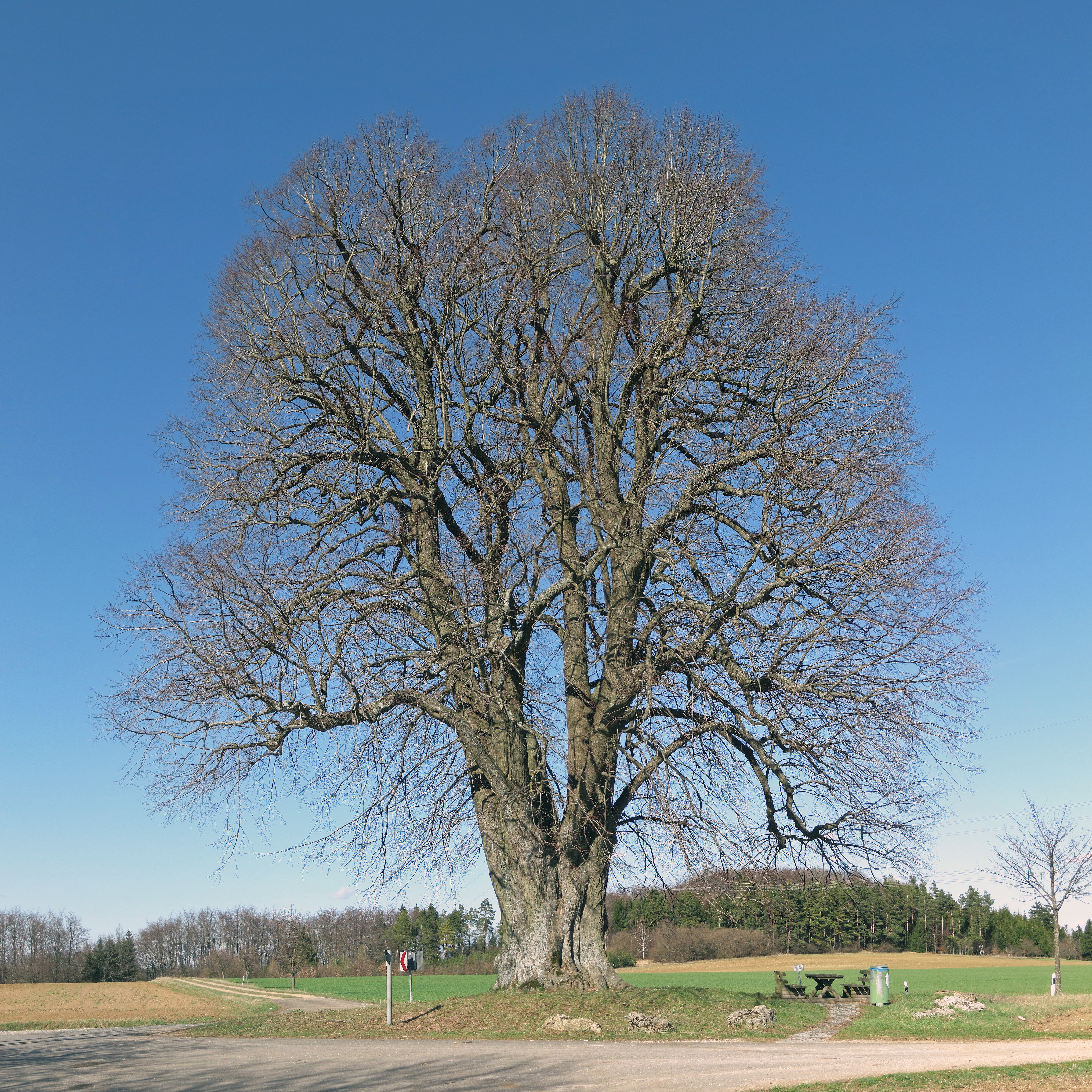 Die Große Linde bei Teuchatz ist ein Naturdenkmal in der Marktgemeinde Heiligenstadt in Oberfranken. Mit einem Umfang von 7,85 Meter zählt die Linde zu den stärksten vollholzigen Linden in Bayern. Ihr Alter wird auf 350 bis 400 Jahren geschätzt und soll im Dreißigjährigen Krieg auf Schwedengräbern gepflanzt worden sein.